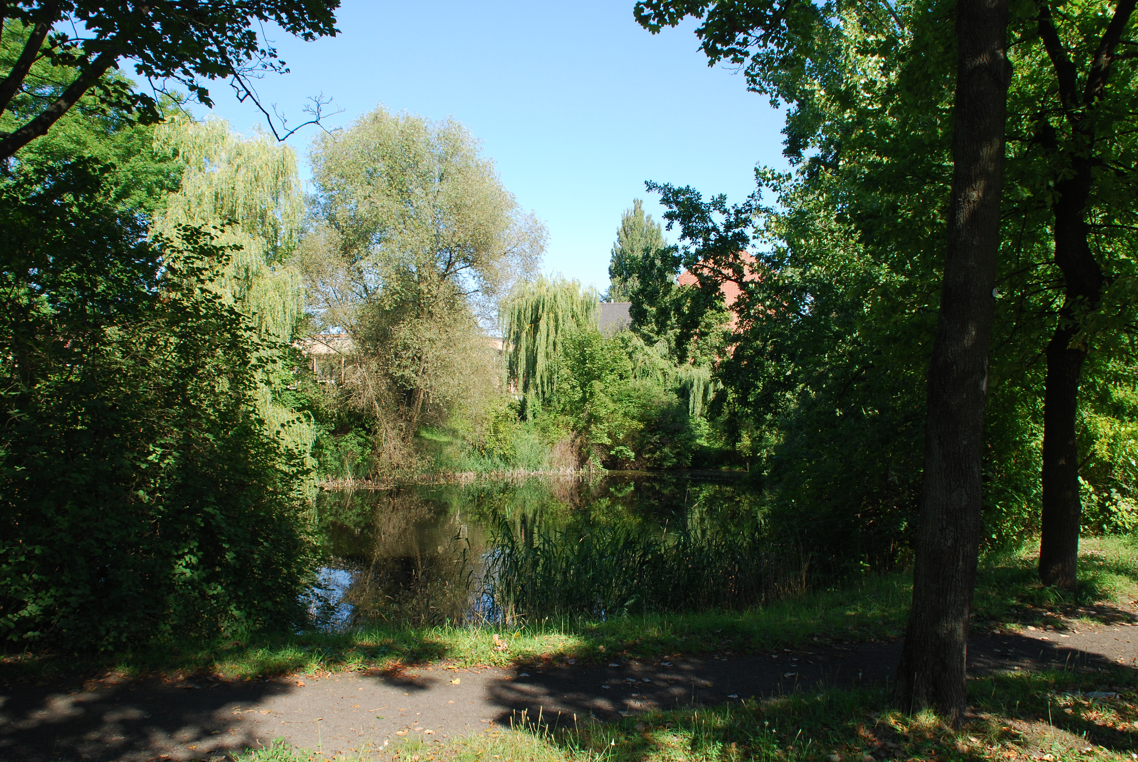 Theaterteich in Frankfurt (Oder), am ehemaligen Kleist-Theater, Friedrich-Ebert-Straße